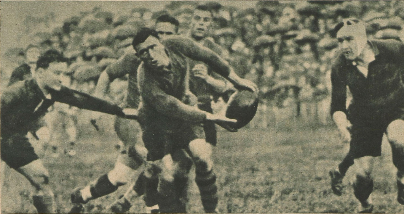 Ouverture du joueur perpignanais Triquera, à droite Joseph Griffard